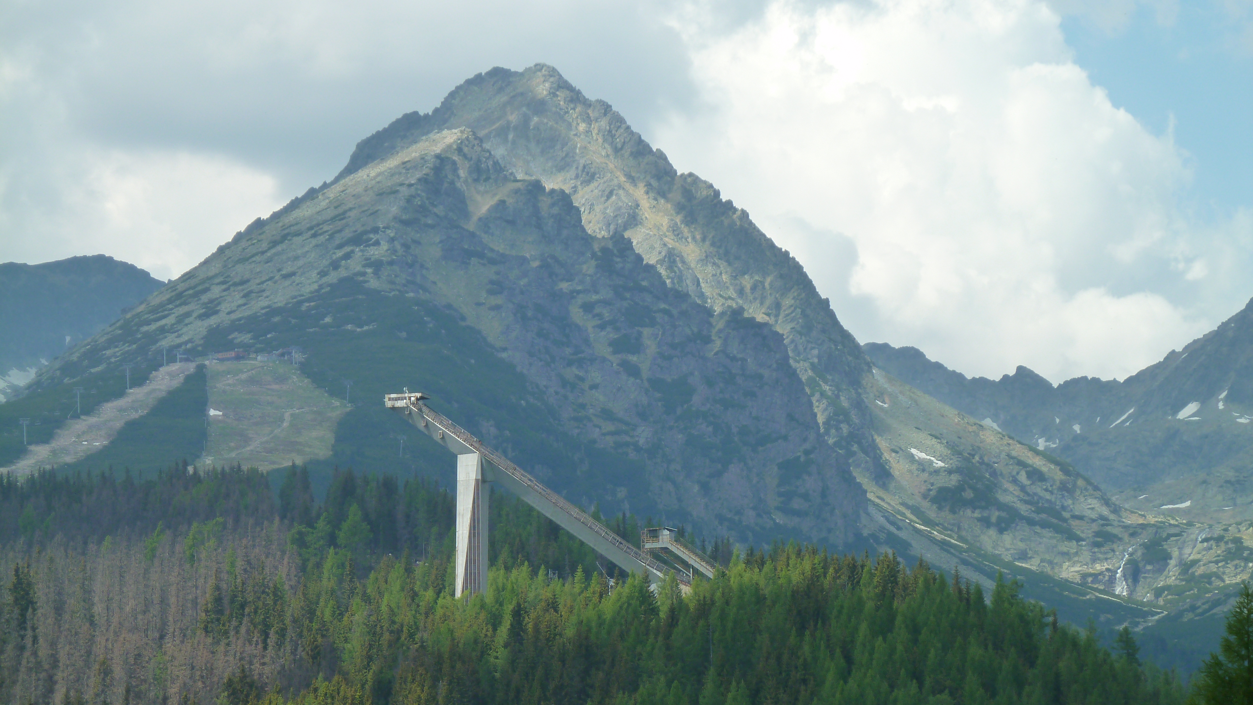 Štrbské Pleso